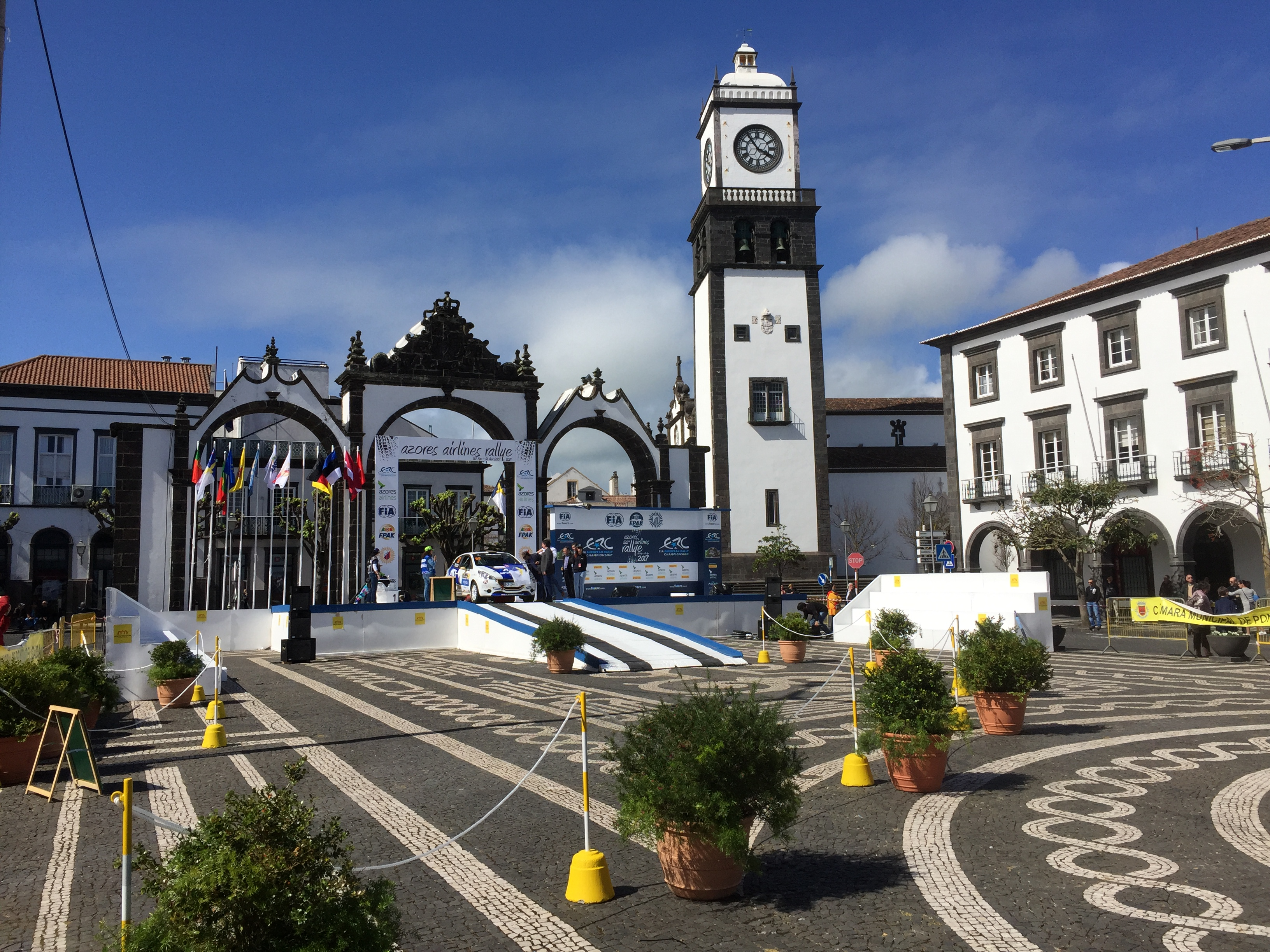 Startpodium van de Azorenrally in 2017.